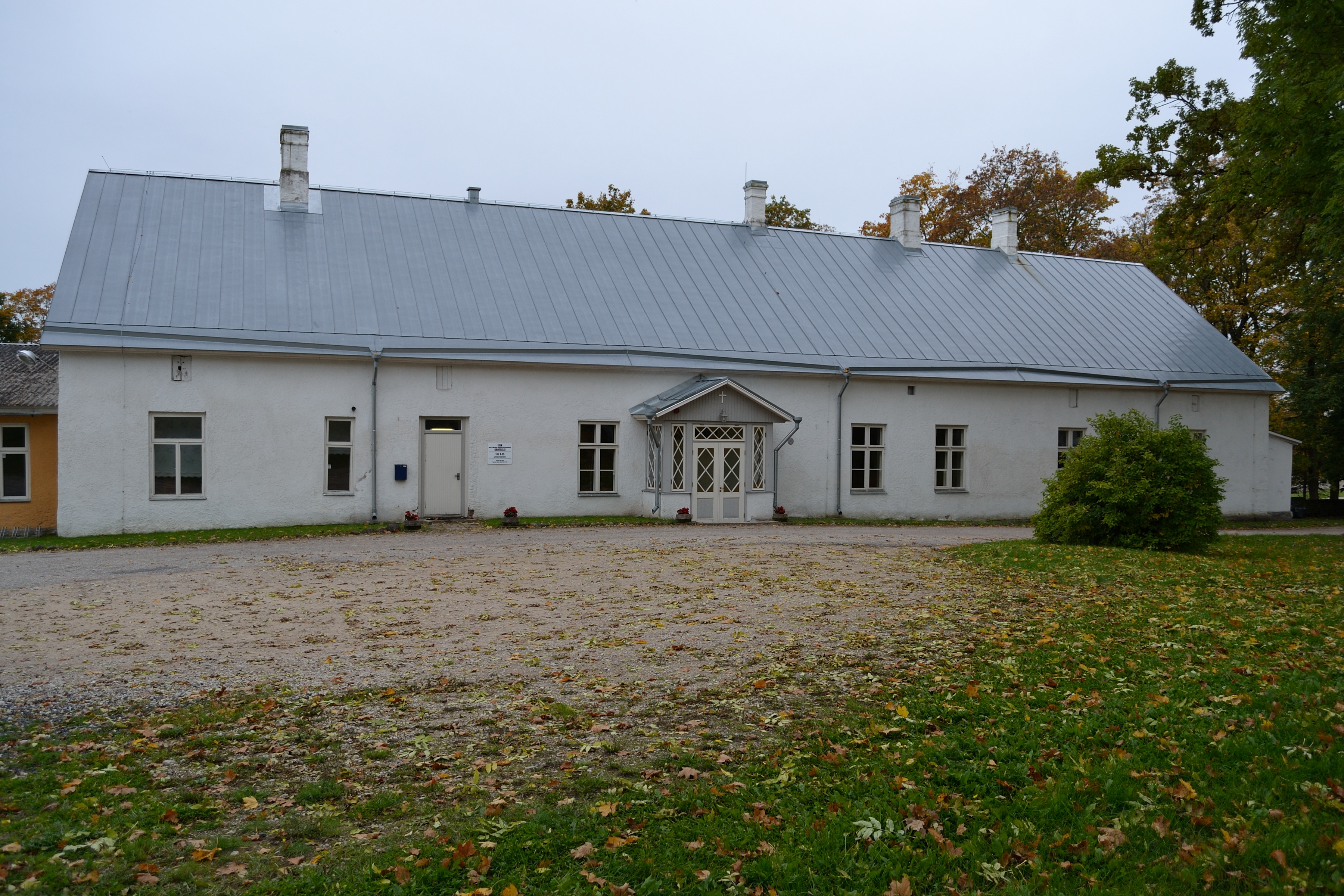 Rapla pastoraadi peahoone